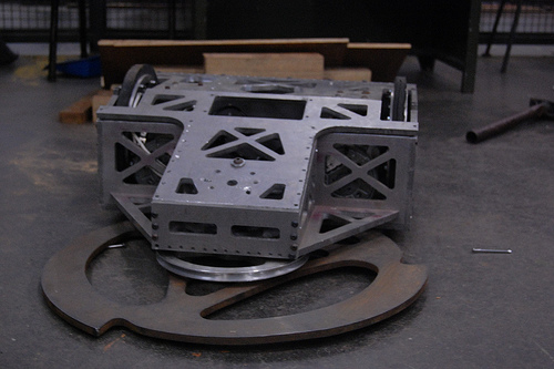 Robô Lenhador